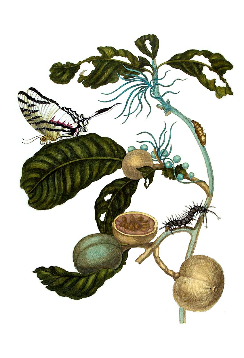 Duroia eriopila